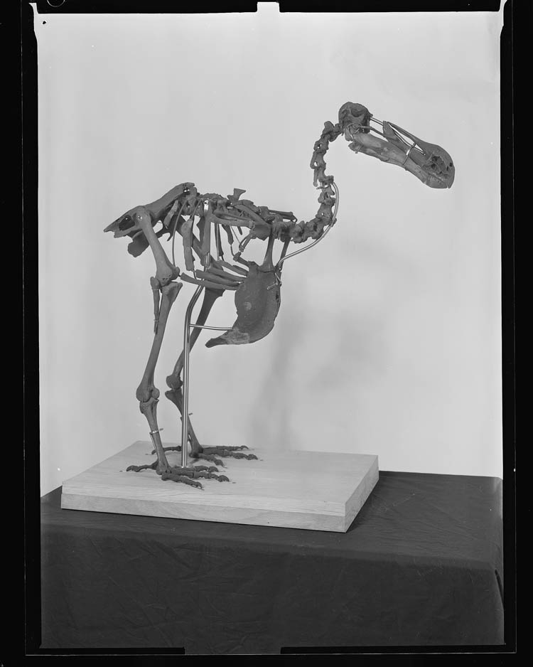 Skelet van een dodo in het Mineralogisch-Geologisch Museum Delft, in 2004 overgegaan naar de collectie van Naturalis, Leiden.